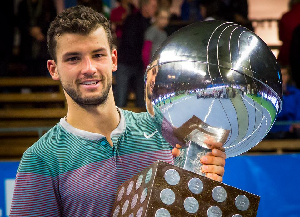 ГРИГОР ДИМИТРОВ-СНИМАНА ОТ ИВО КОСТОВ